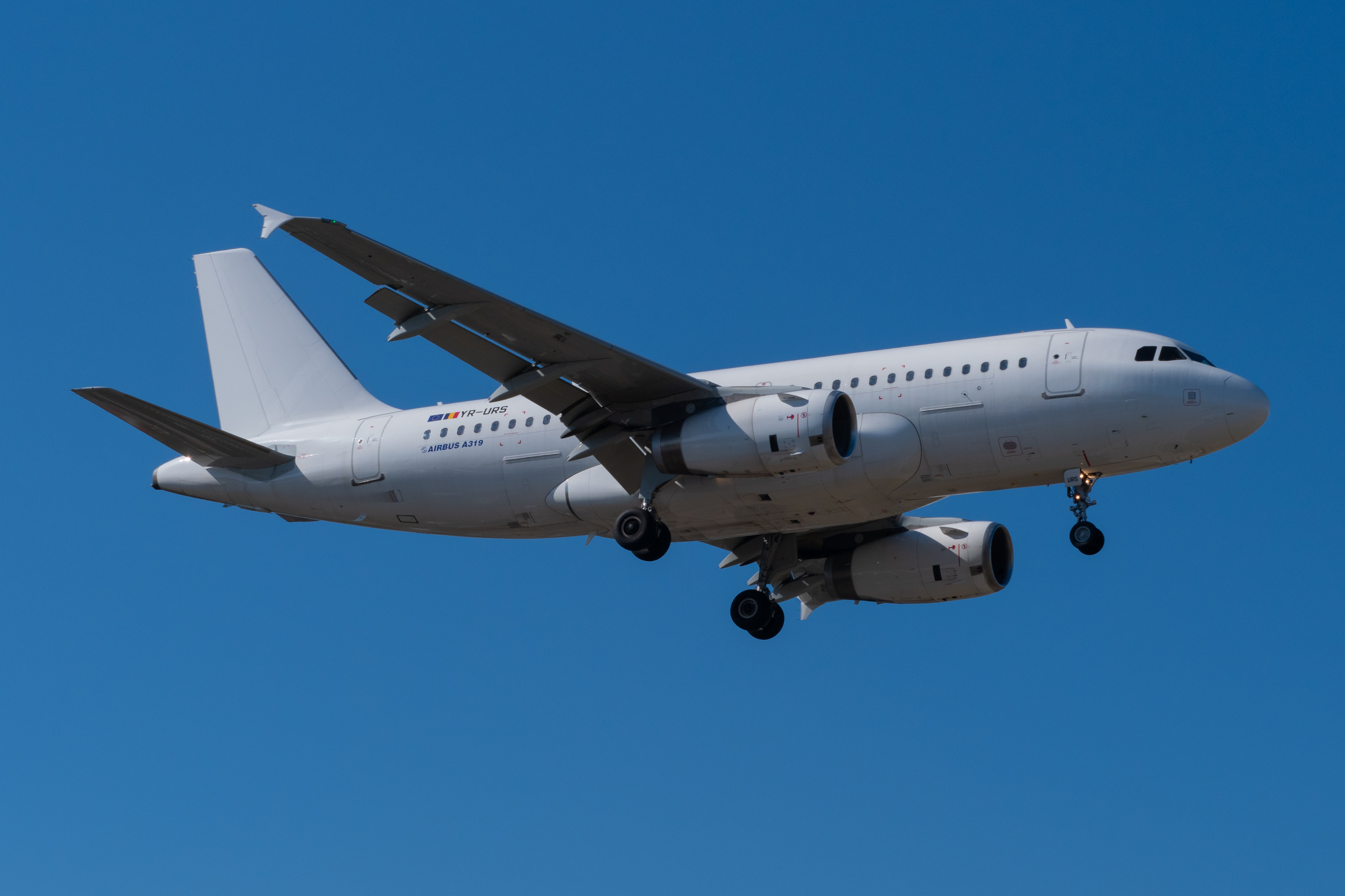 Geneva International Airport